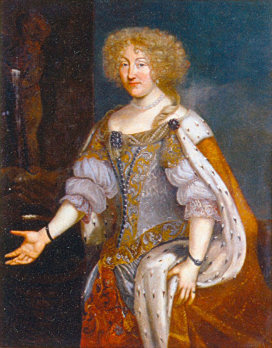 Herzogin Magdalena Sibylla von Hessen-Darmstadt (1652-1712), Herzogin von Württemberg, im Galakleid